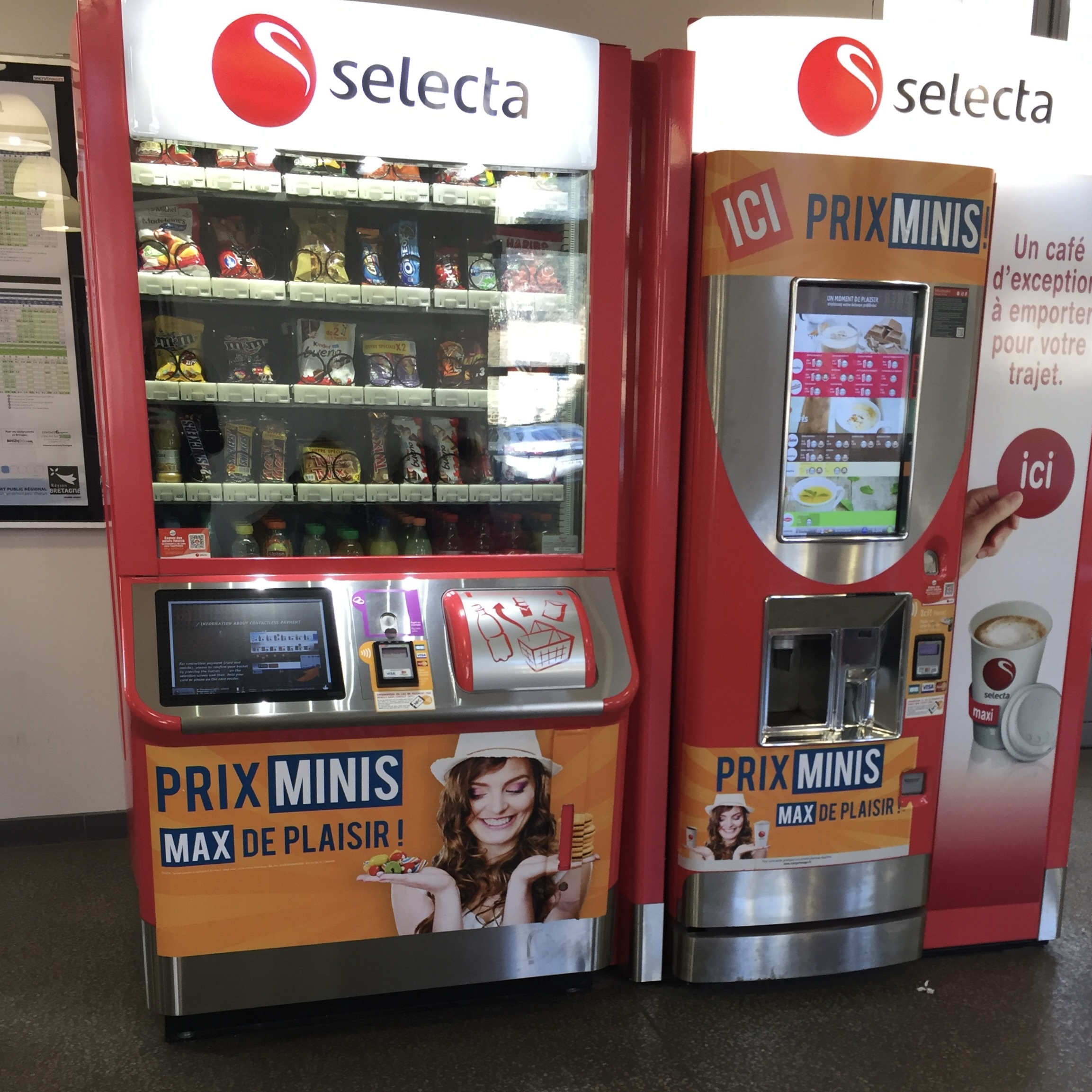 Distributeur selecta dans la gare de Redon en Bretagne.